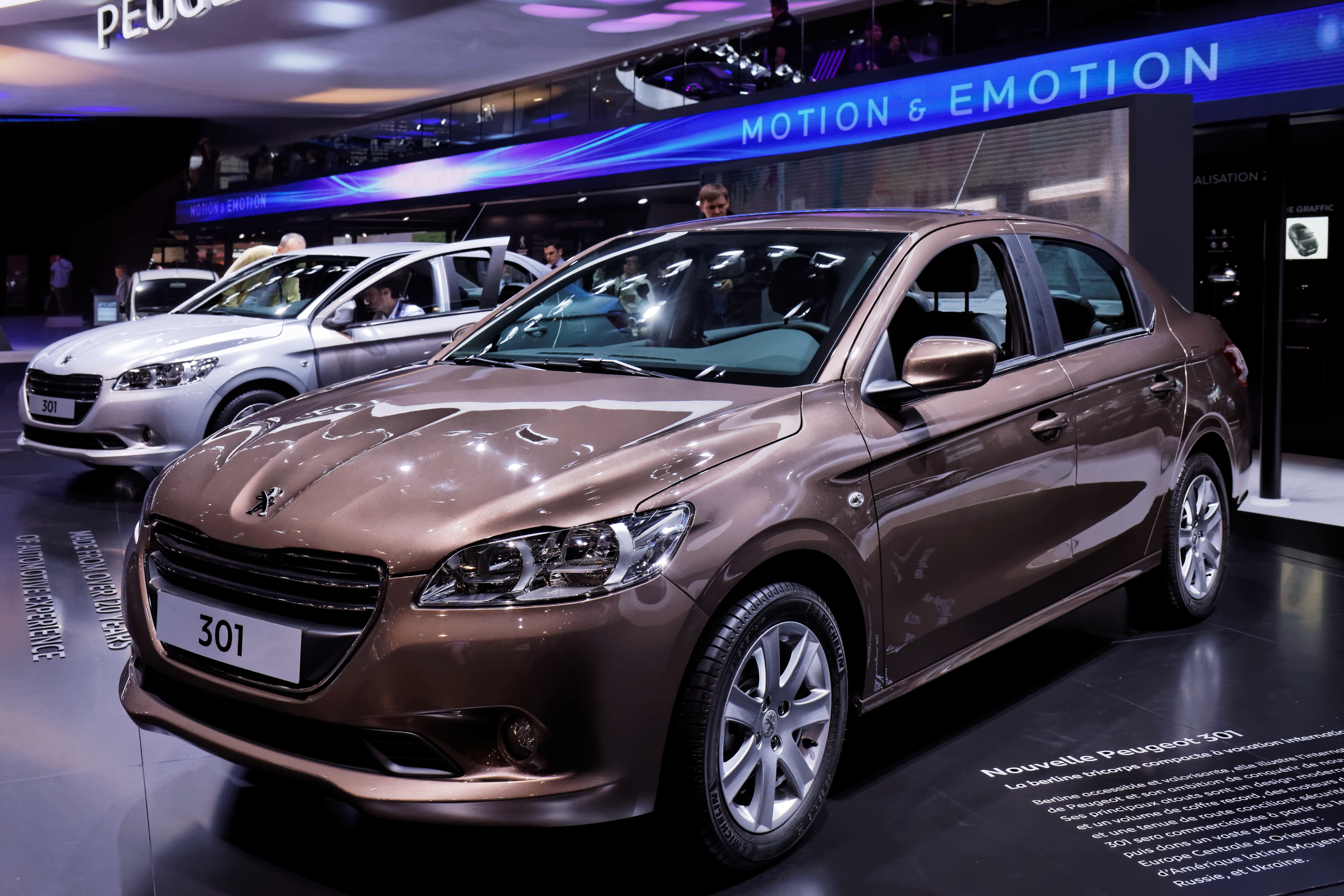 Une Peugeot 301 présentée lors du Mondial de l'Automobile de Paris 2012.